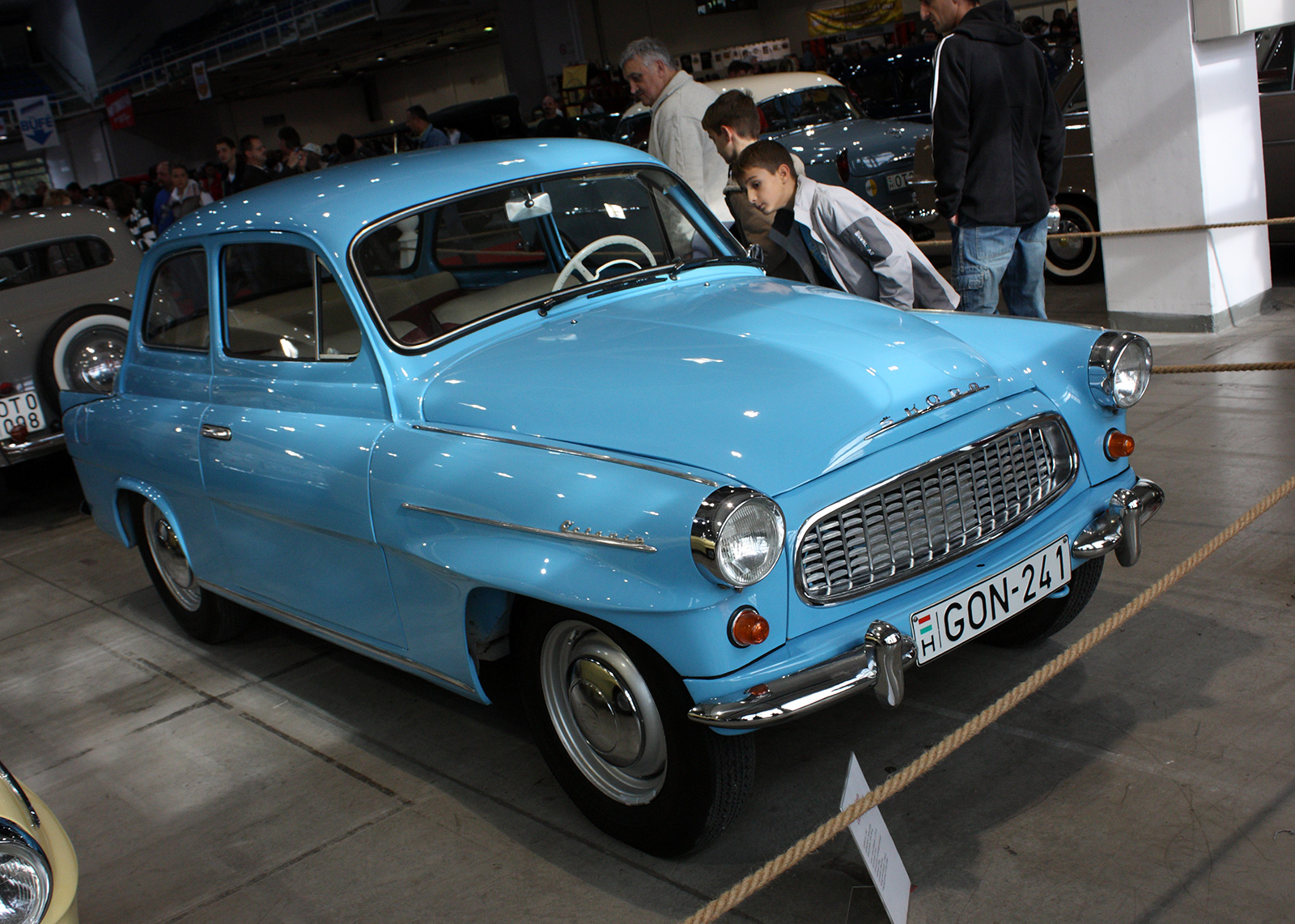 Skoda Octavia